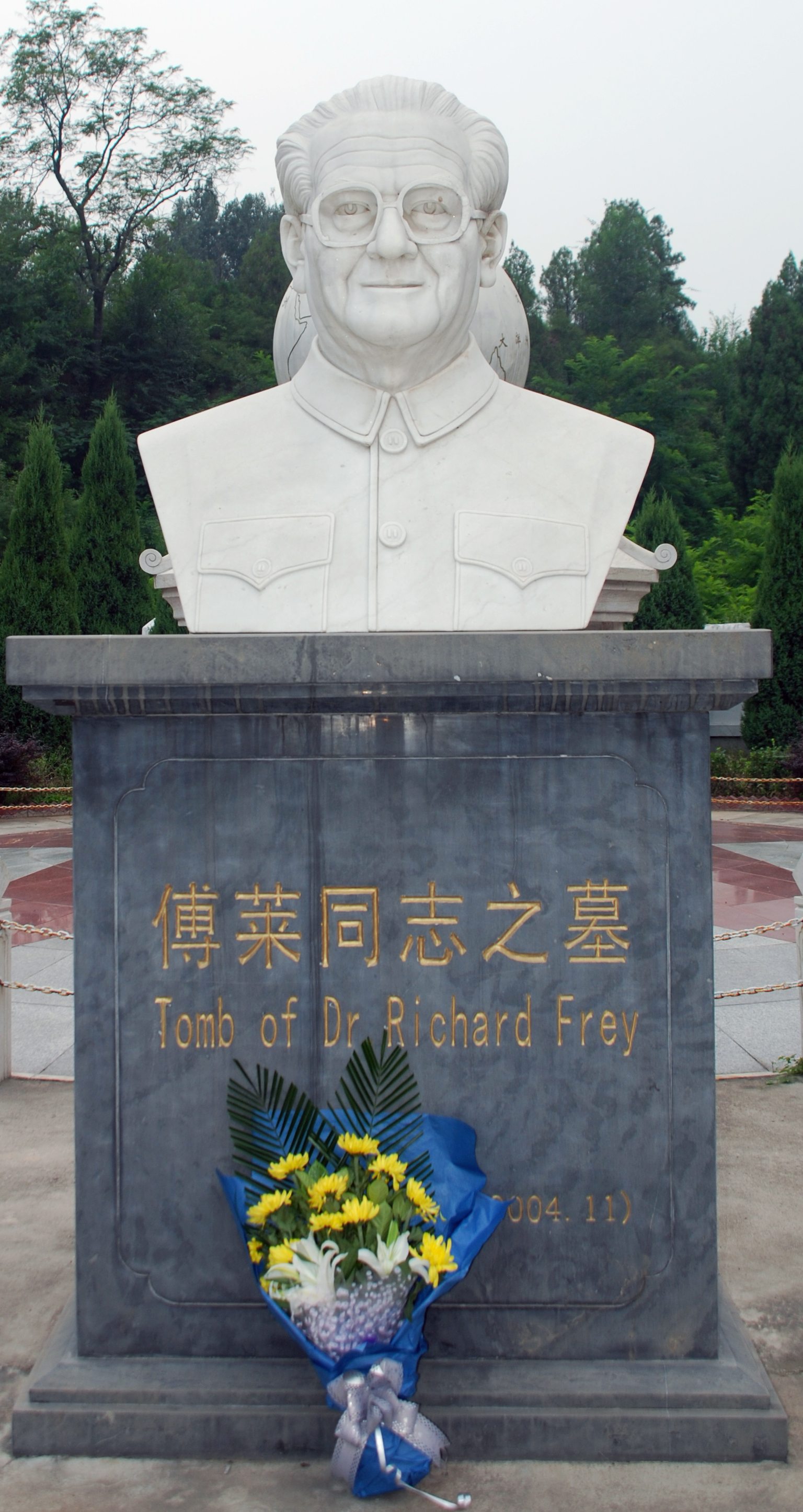 Denkmal von Richard Frey in China